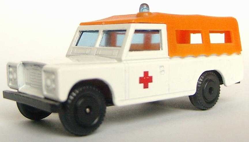 Efsi Land Rover